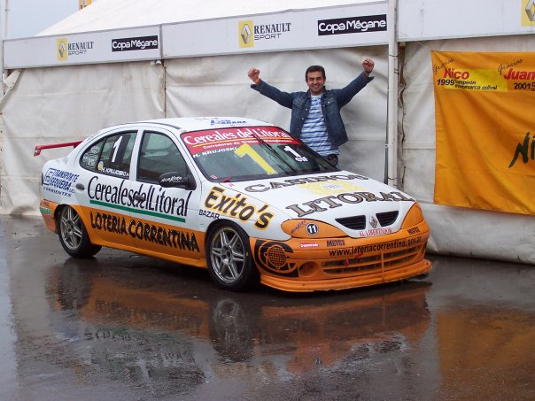 Humberto Krujoski, campeón 2002 de la Copa Mégane